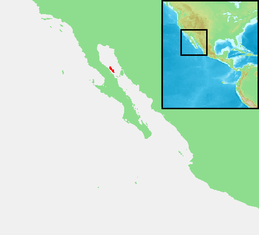 Isla Ángel de la Guarda, Mexico